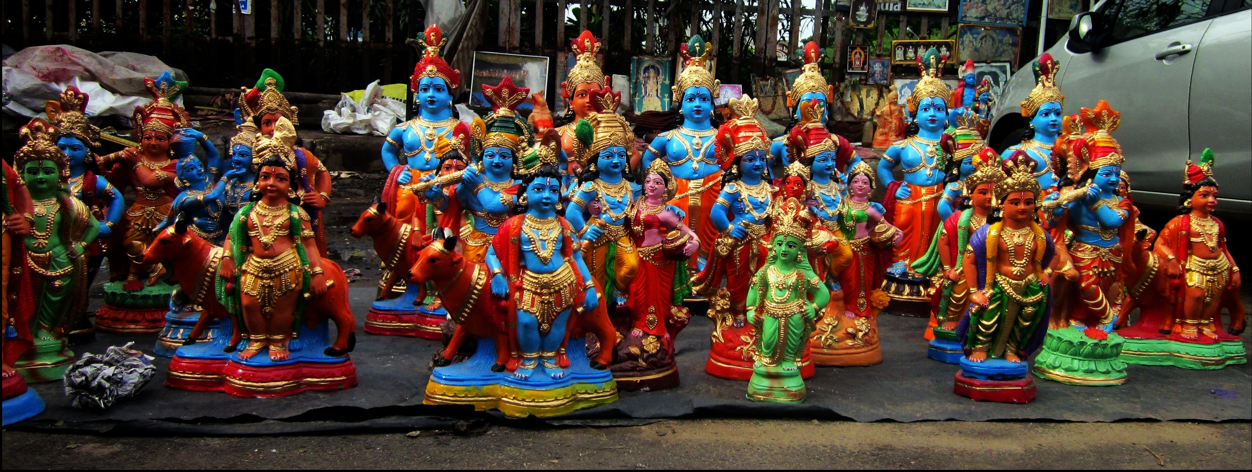 நவராத்திரி திருவிழா சமயத்தில் தெருவோரத்தில் விற்பனைக்காக வைக்கப்பட்டிருக்கும் கடவுள் பொம்மைகள்